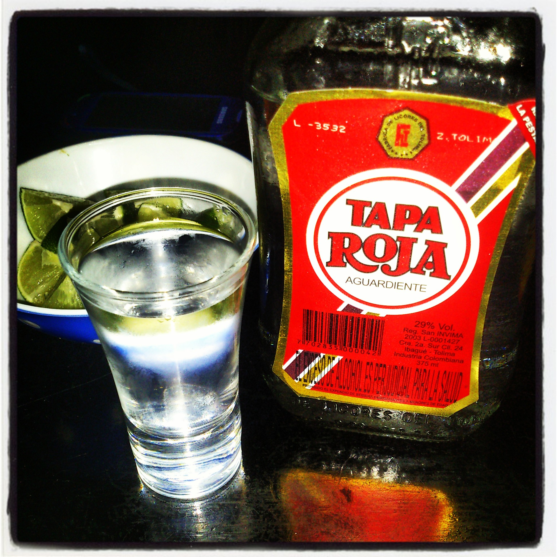 Aguardiente TAPA ROJA